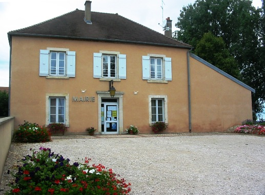 La mairie de Champdivers (39)